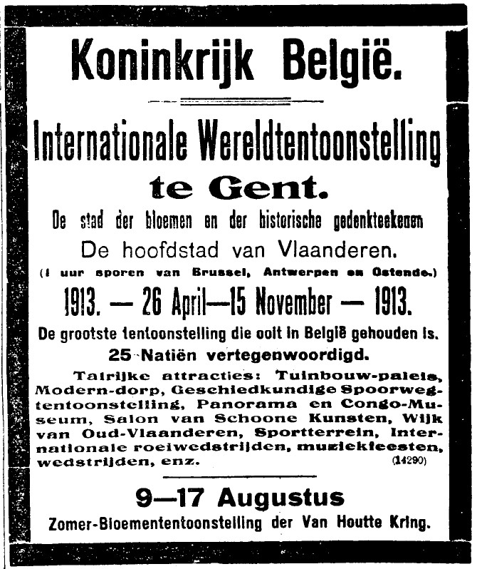 Advertentie in "Algemeen Handelsblad" van 5 augustus 1913 voor de Wereldtentoonstelling te Gent